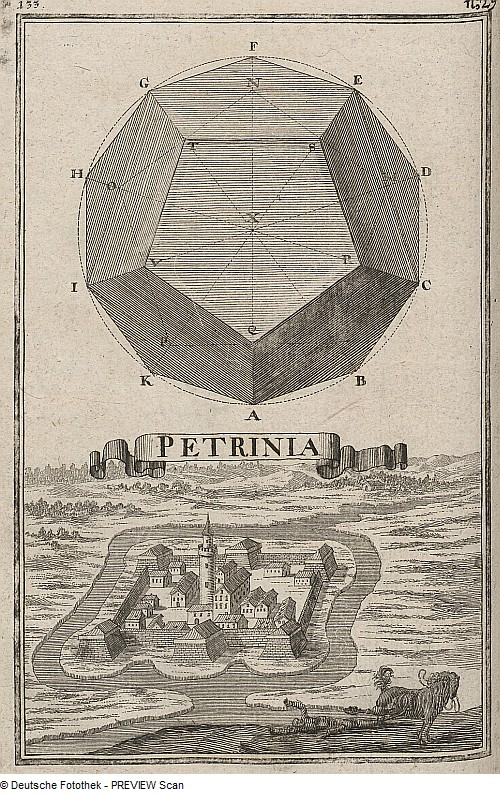 Original image description from the Deutsche FotothekGeometrie & Architektur & Festungsbau & Vermessung